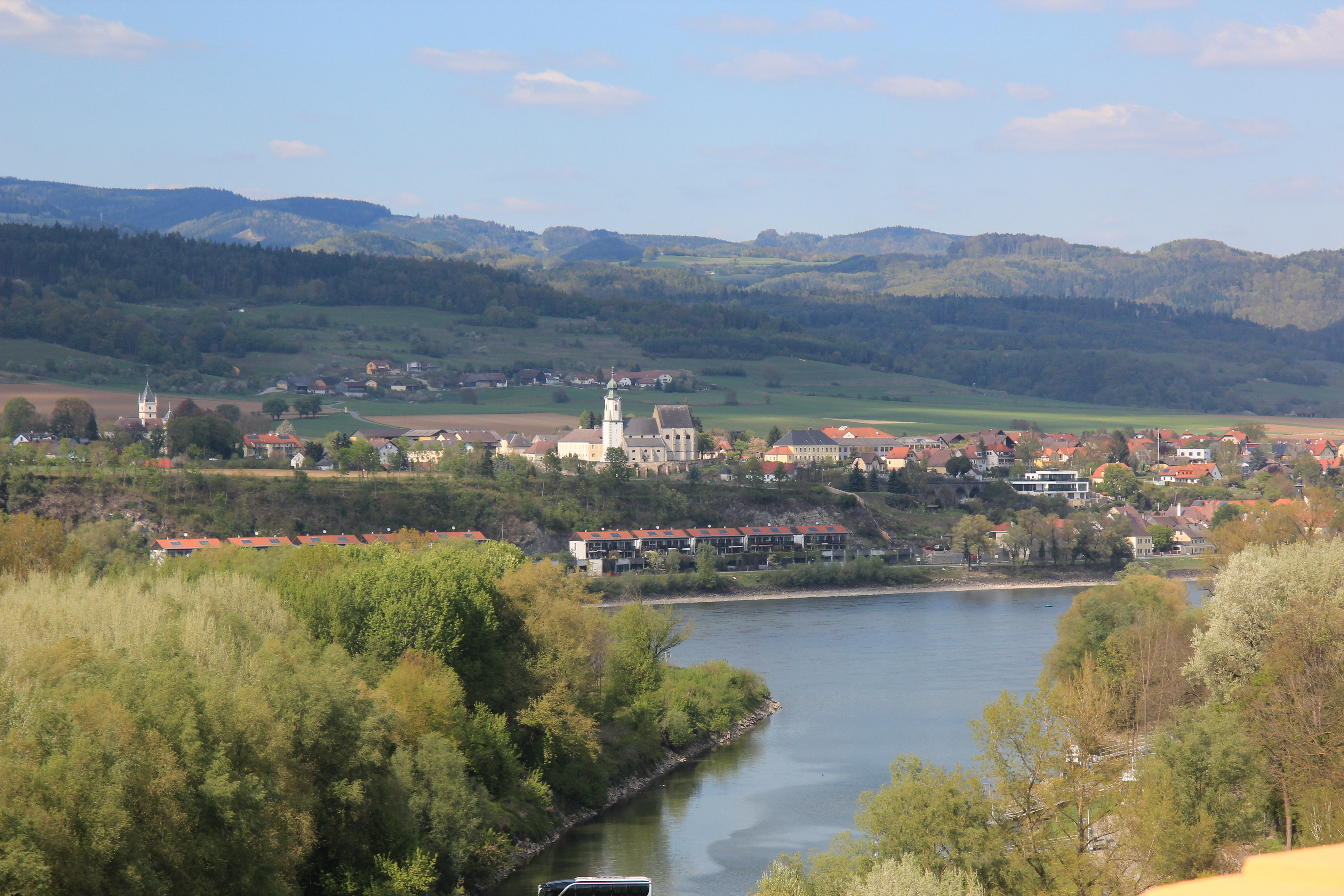 Blick auf die Donau mit Altarm, im Hintergrund Emmersdorf